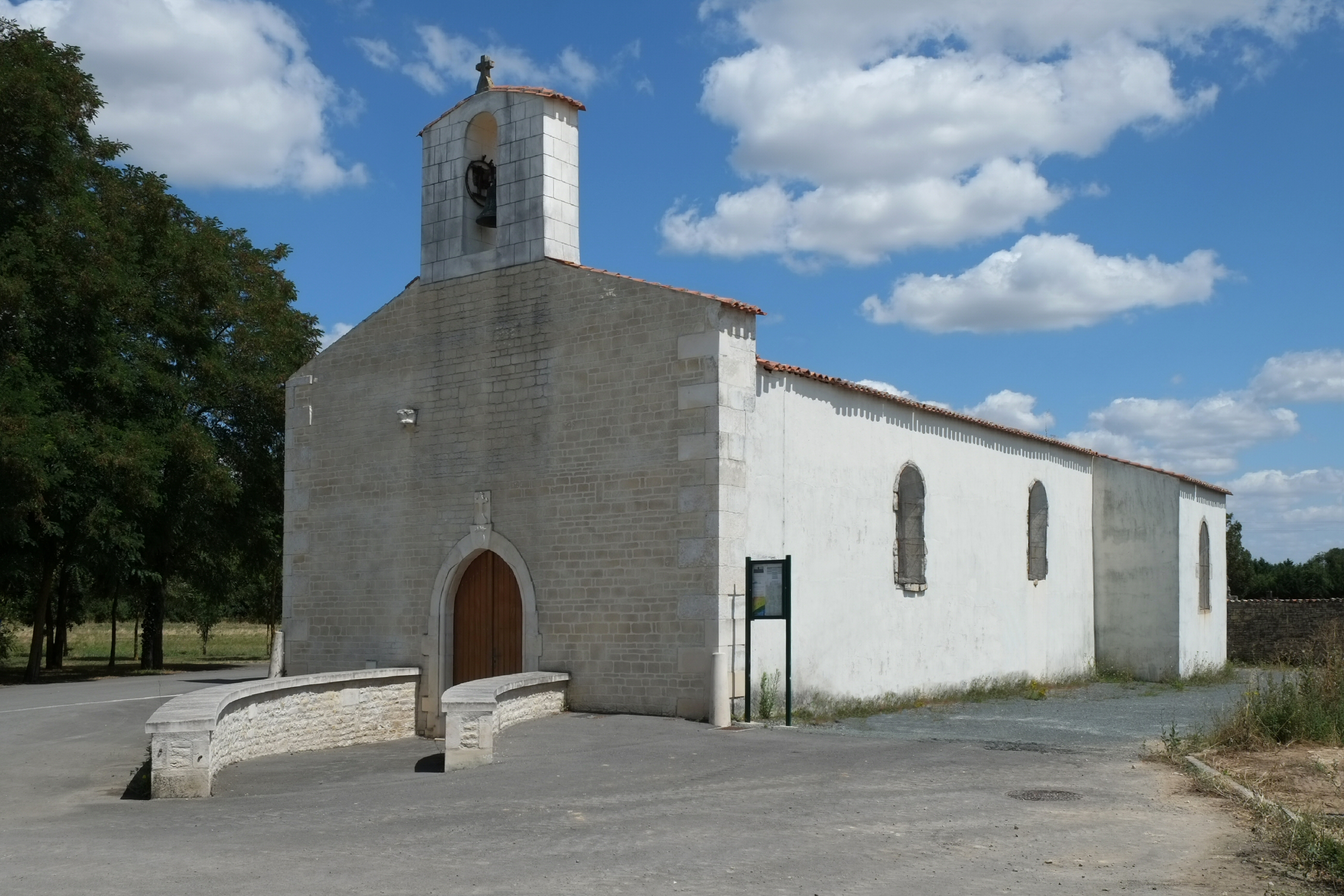 Église Sainte-Marie-Madeleine Ferrières Charente-Maritime France